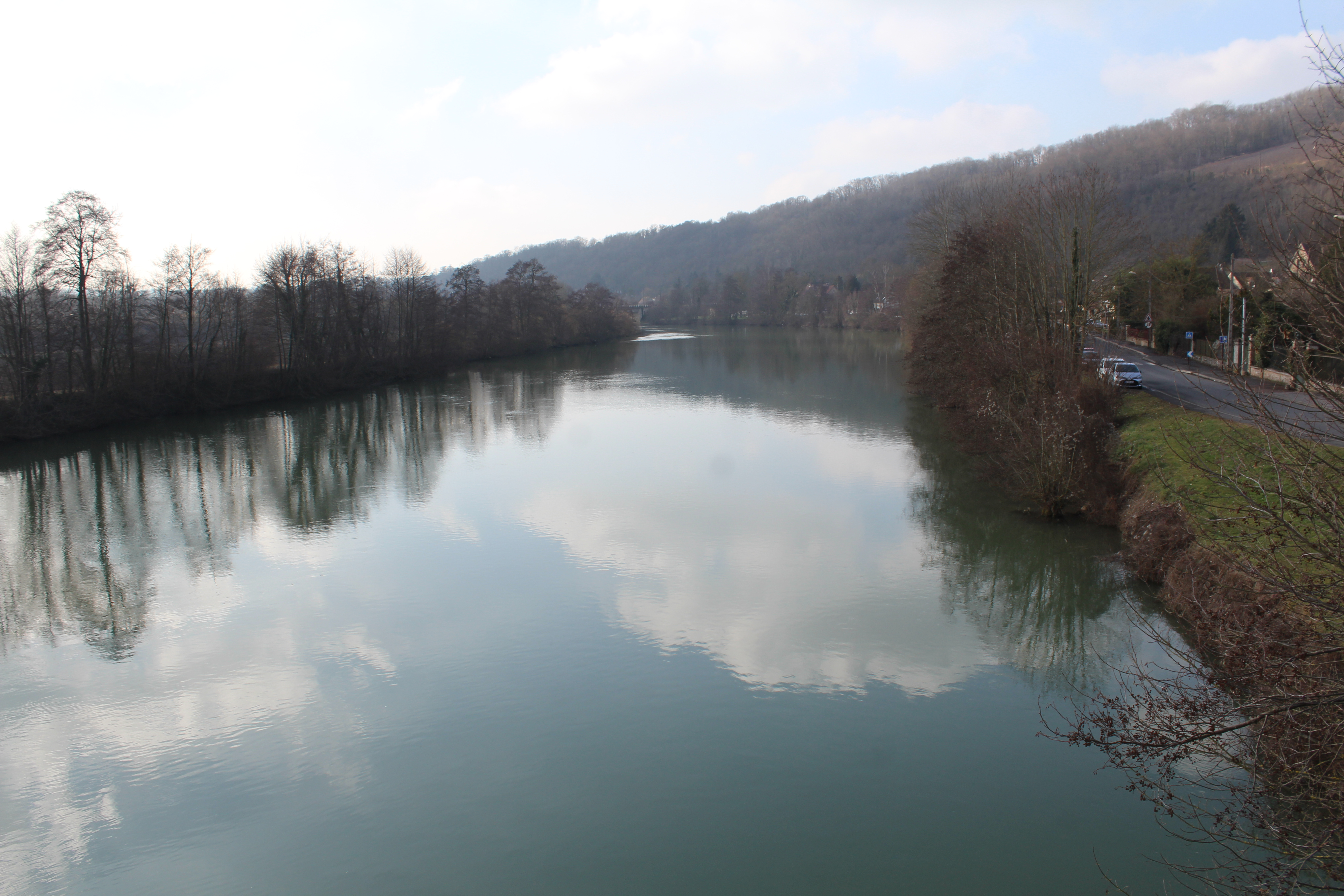 La Marne entre Saâcy et Nanteuil-sur-Marne.